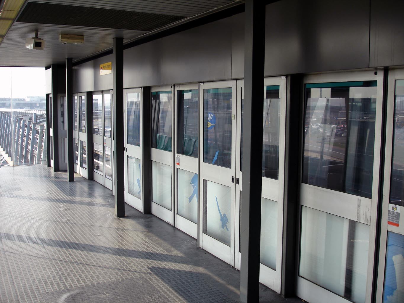 Portes palières d'Orlyval, station départs Orly-Sud